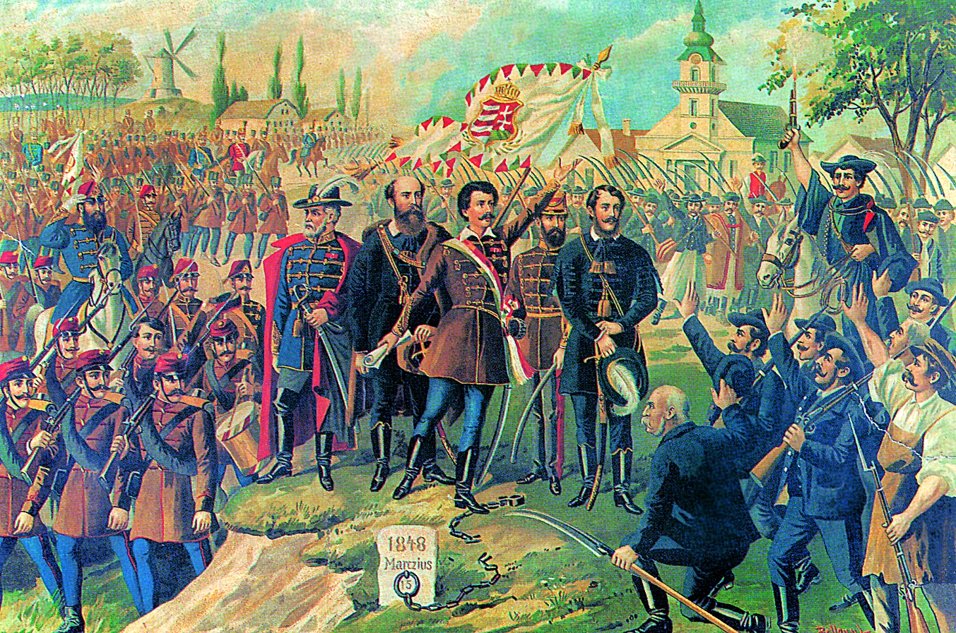 Forradalom és szabadságharc 1848–49-ben. Bellony László festménye